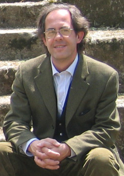 Xavier en el teatro de Tusculum